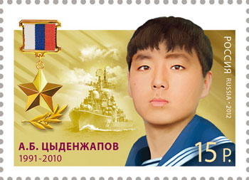 Почтовая марка России из серии "Герои Российской Федерации". 15,00 руб., 7 мая 2012 г. Каталог ИТЦ "Марка" № 1589. Алдар Баторович Цыденжапов — машинист дивизиона живучести электромеханической боевой части эскадренного миноносца «Быстрый» Тихоокеанского флота РФ. За мужество и героизм, проявленные при исполнении воинского долга, посмертно присвоено звание Герой Российской Федерации